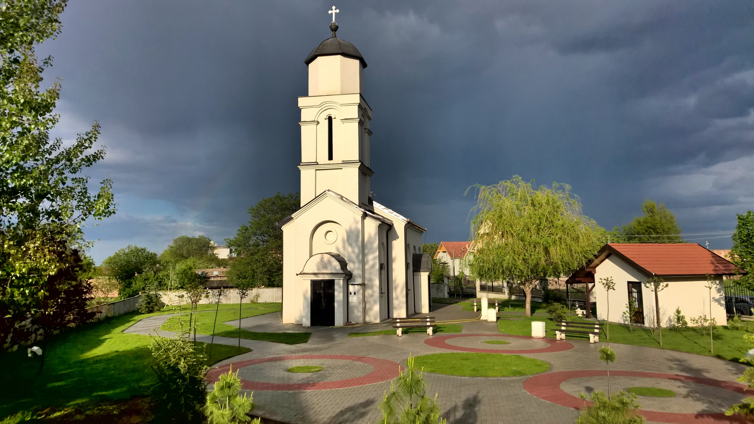 порта храма у Љукову